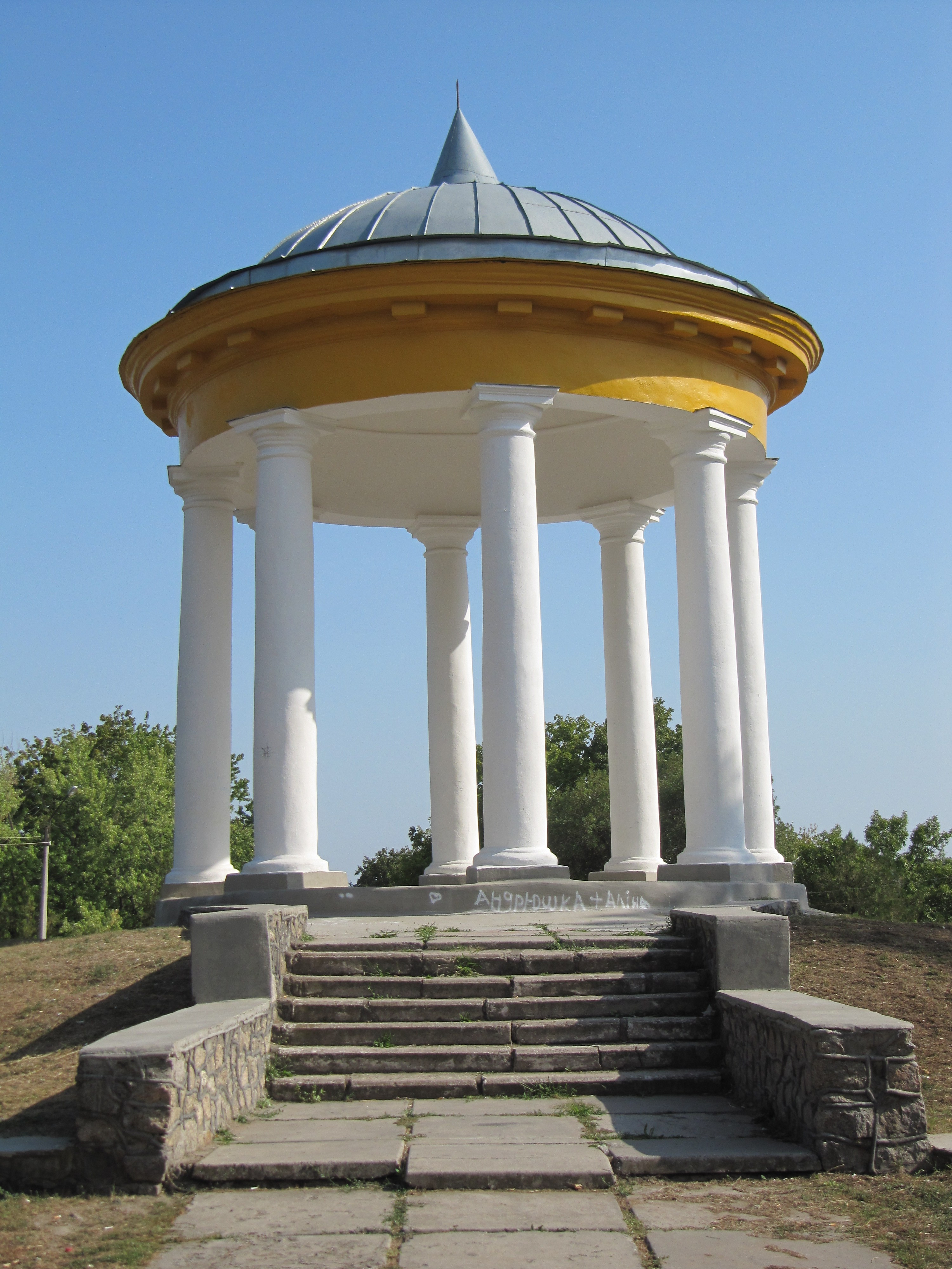 Вознесенськ, візитівка міста Царська ротонда Миколаївська весна у Вікіпедії